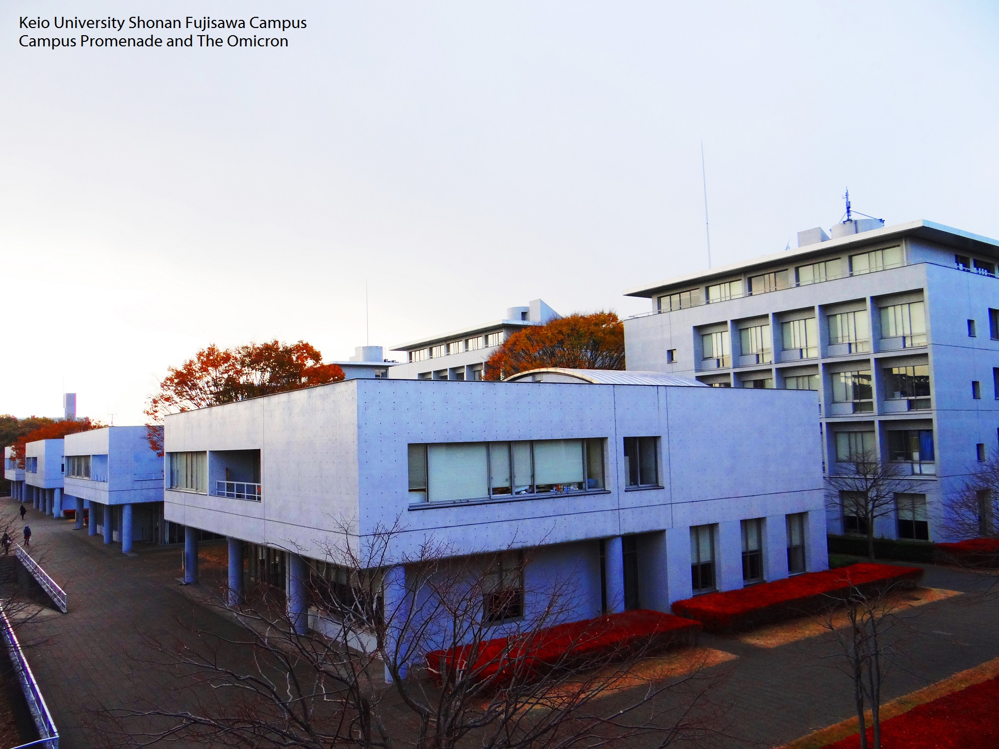 Keio University SFC KEIO